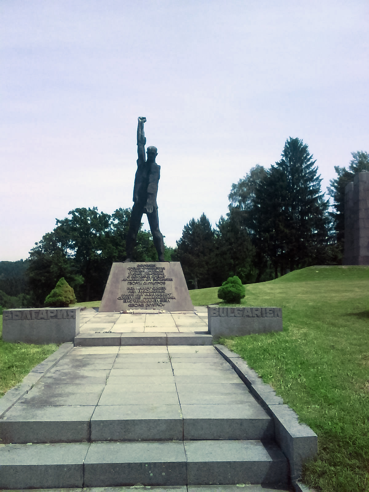 Bulgarische Gedenkstätte im ehemaligen KZ Mauthausen